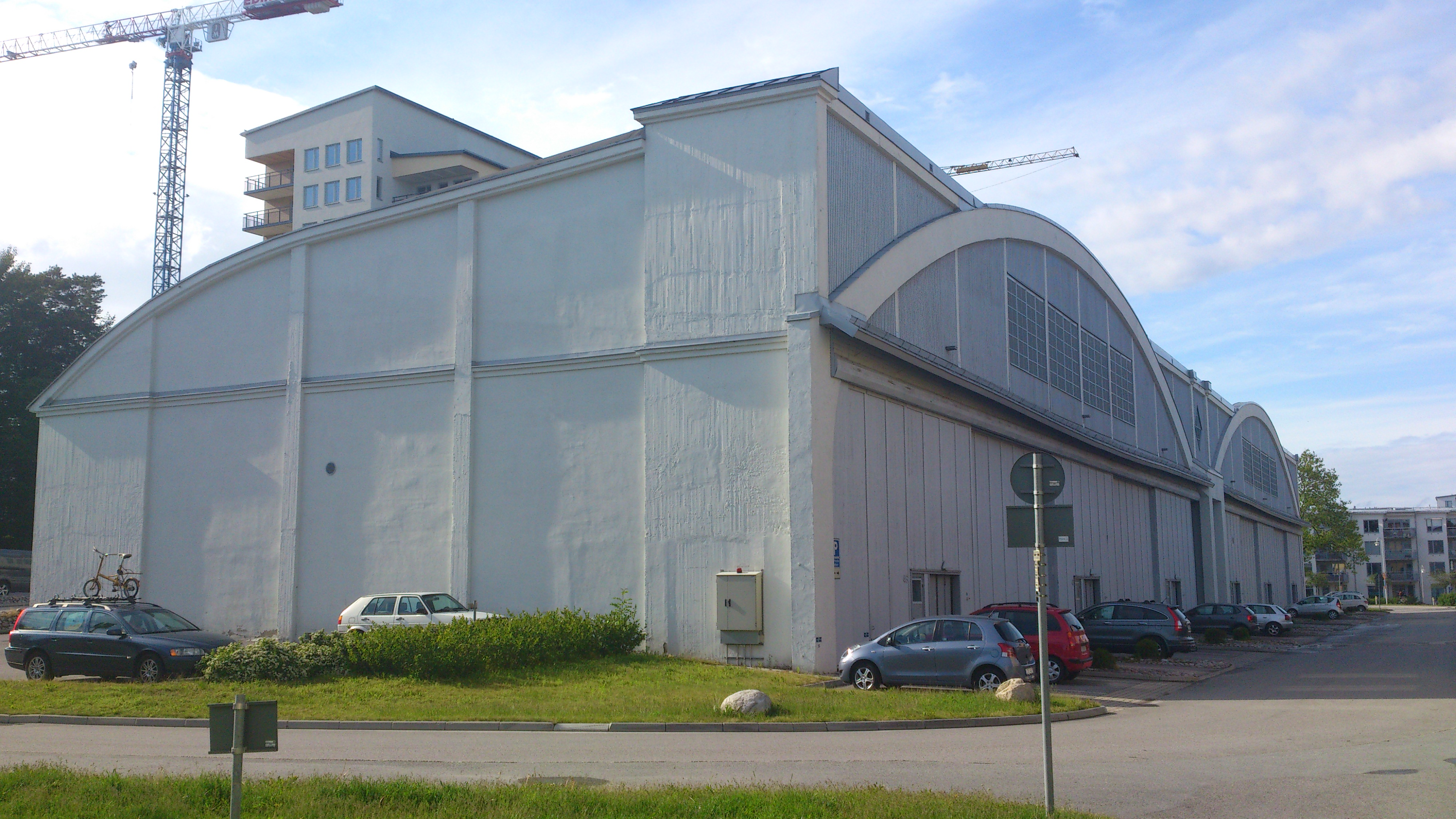 Hangarbyggnad, vid f.d Roslagens flygflottilj eller även känt som F 2 Hägernäs.